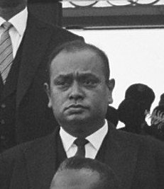 Collectie / Archief : Fotocollectie Anefo Reportage / Serie : Koningin Juliana en prins Bernhard op bezoek in Suriname Beschrijving : koningin Juliana te midden van Raad van Ministers van Suriname Datum : 14 oktober 1965 Locatie : Paramaribo, Suriname Trefwoorden : koninklijke bezoeken, ministers, regeringen Persoonsnaam : Juliana (koningin Nederland), Juliana, koningin Fotograaf : HYVO / Anefo (opdracht) Auteursrechthebbende : Nationaal Archief Materiaalsoort : Negatief (zwart/wit) Nummer archiefinventaris : bekijk toegang 2.24.01.03 Bestanddeelnummer : 918-3159